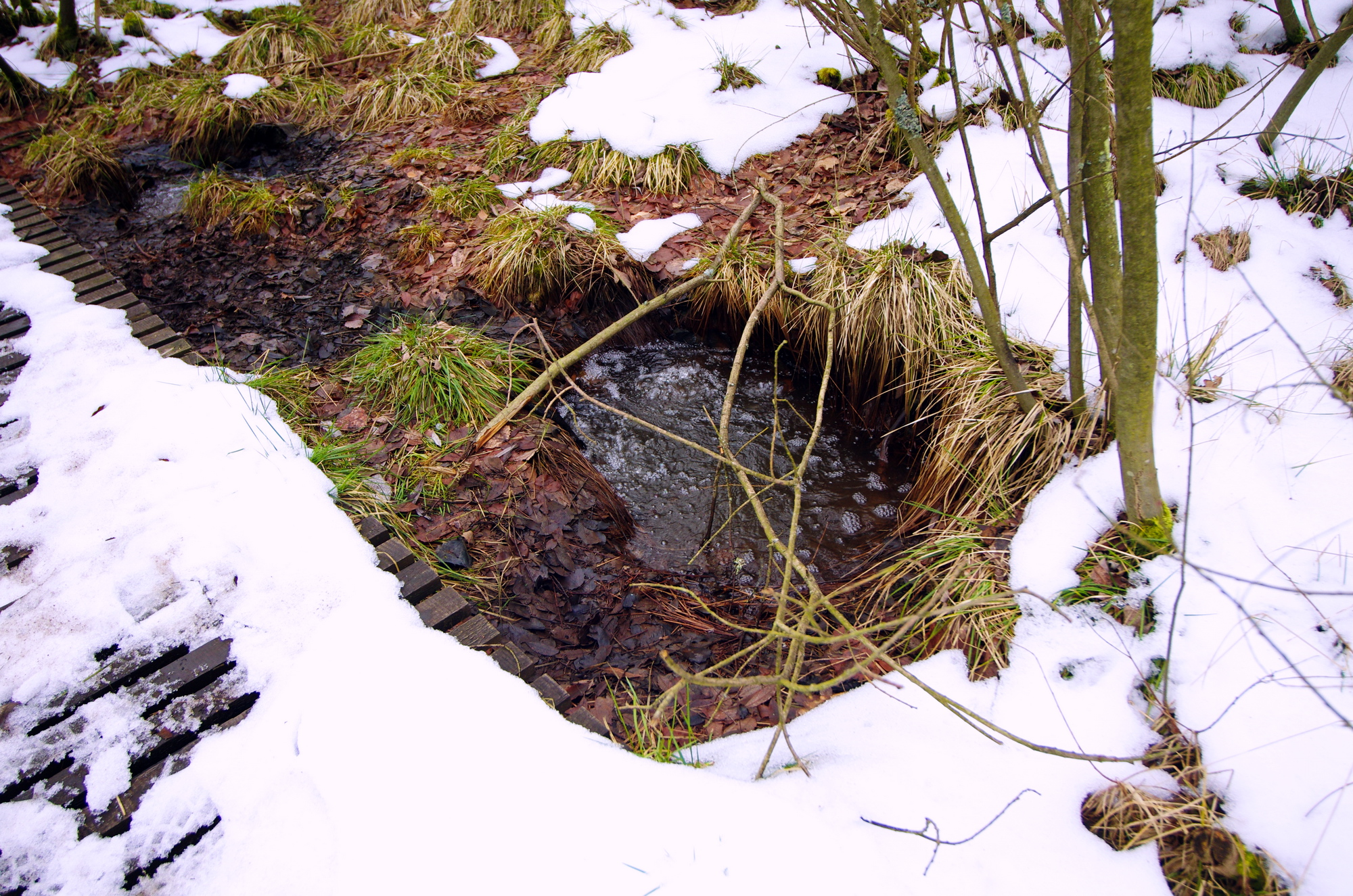 Hartoušovské mofety, významný krajinný prvek, okres Cheb